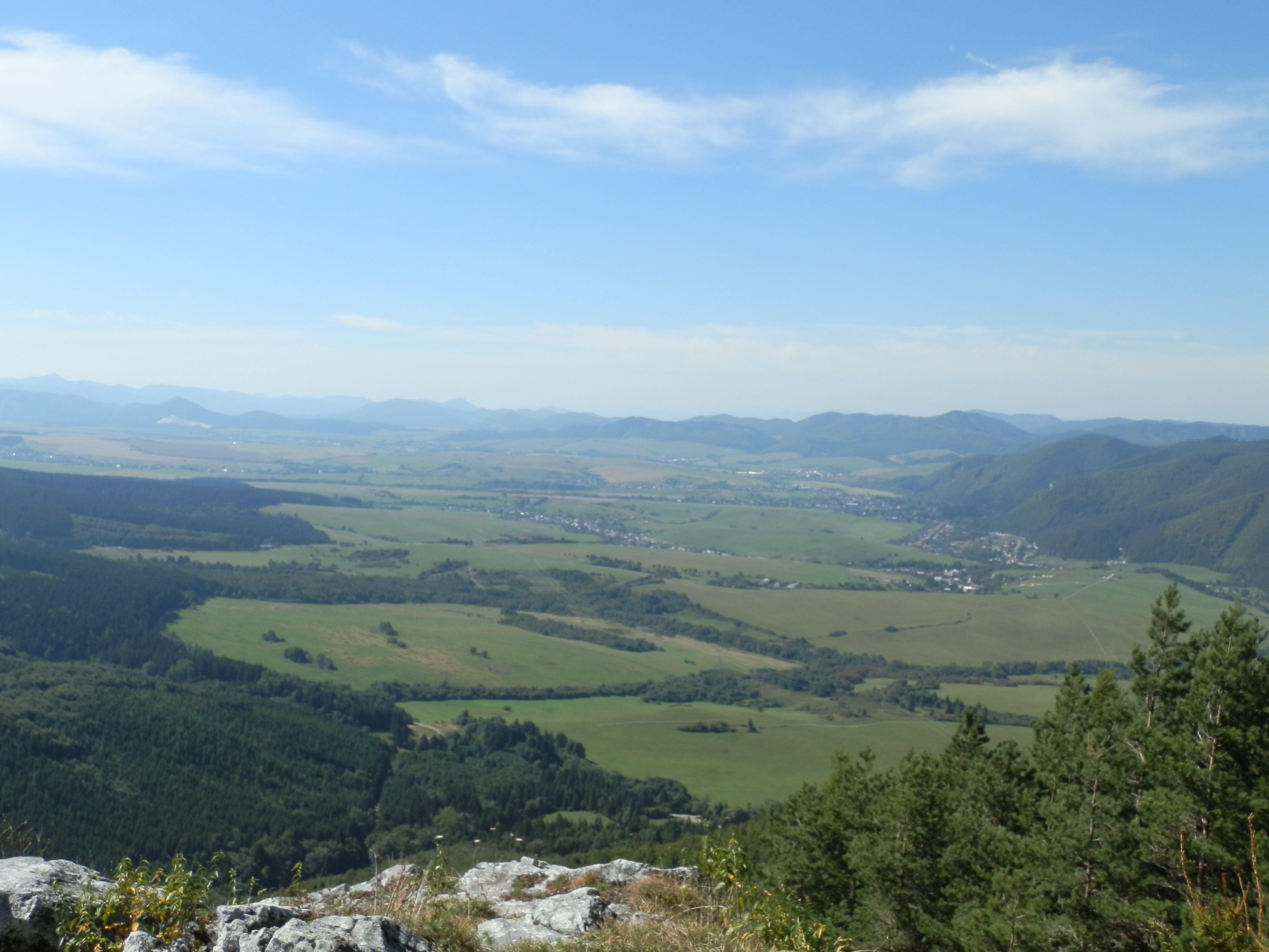 Celá Rajecká dolina z Čipčia